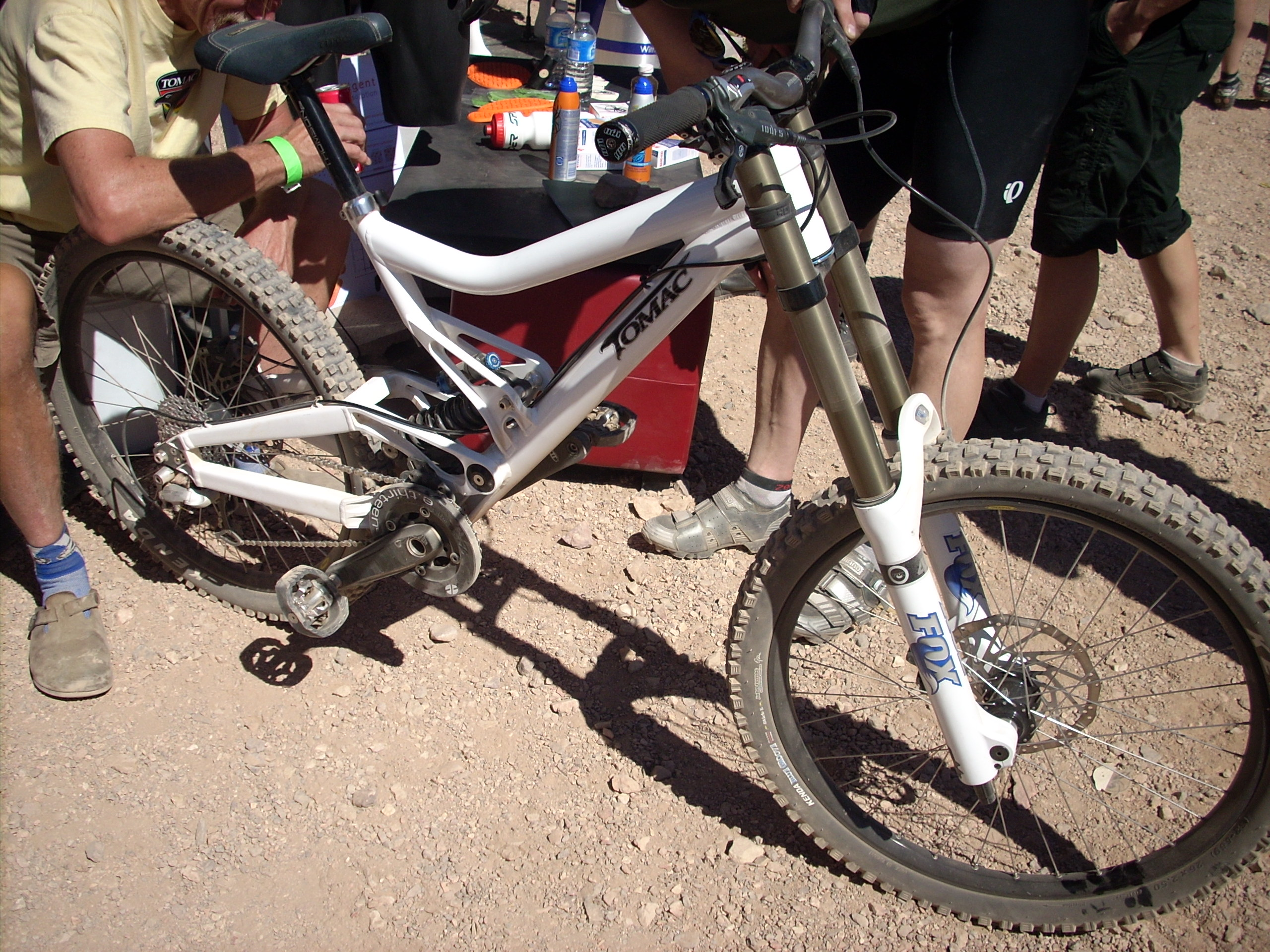 Tomac DH bike